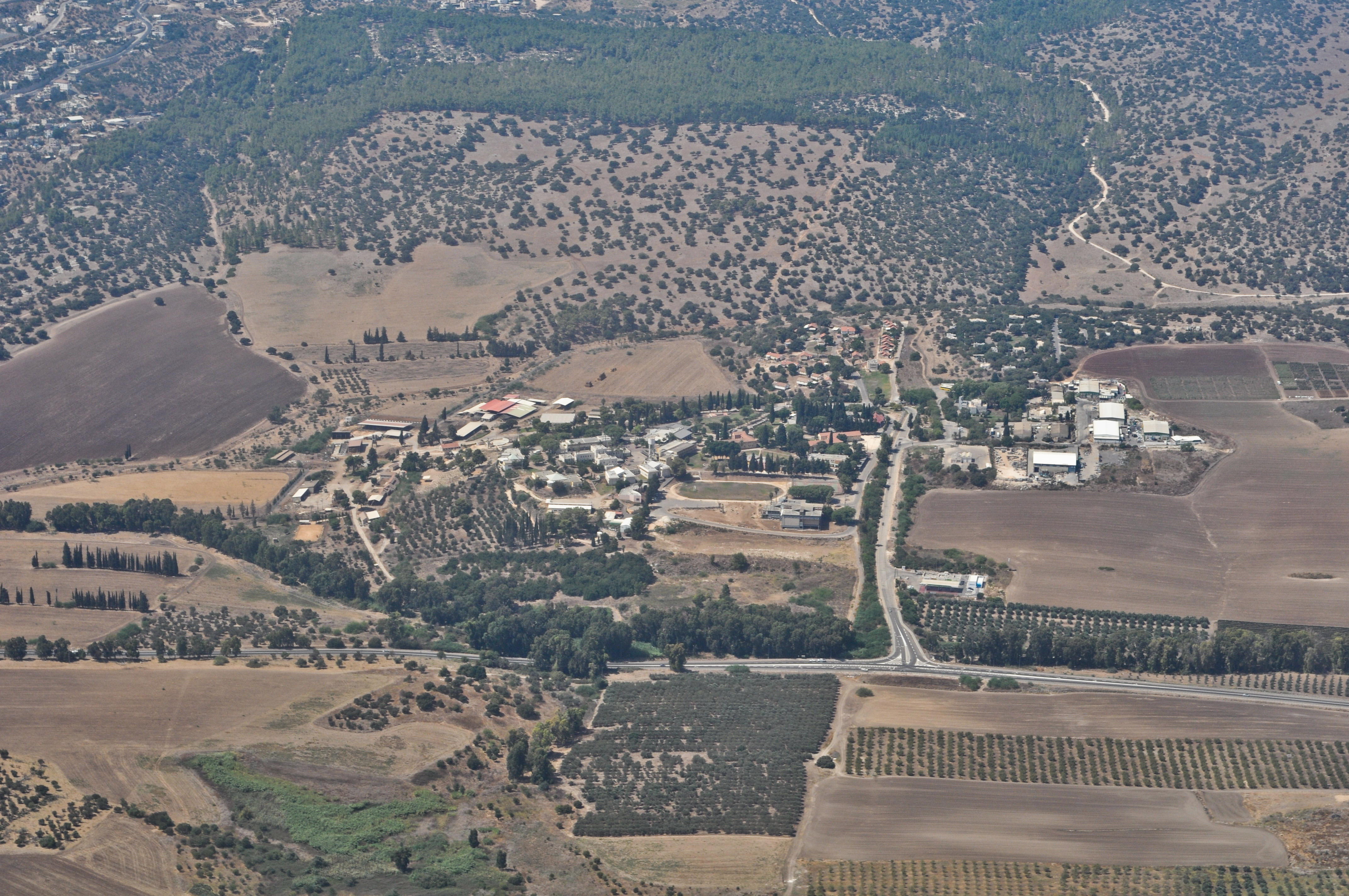 בית הספר החקלאי "כדורי"